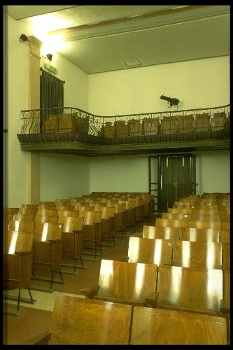 Teatro comunale di Mordano